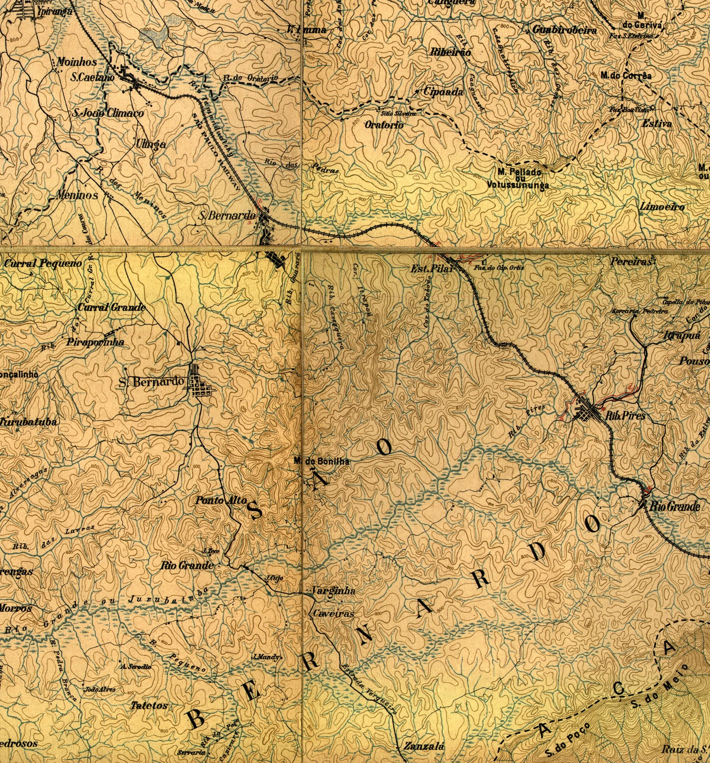 Mapa da cidade de São Bernardo (São Paulo - Brasil) e região em 1906